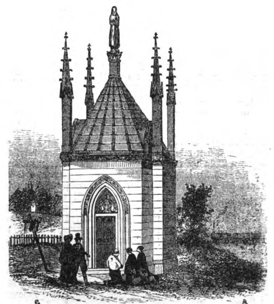 "Chapelle de Notre-Dame-des-Flammes à Bellevue".